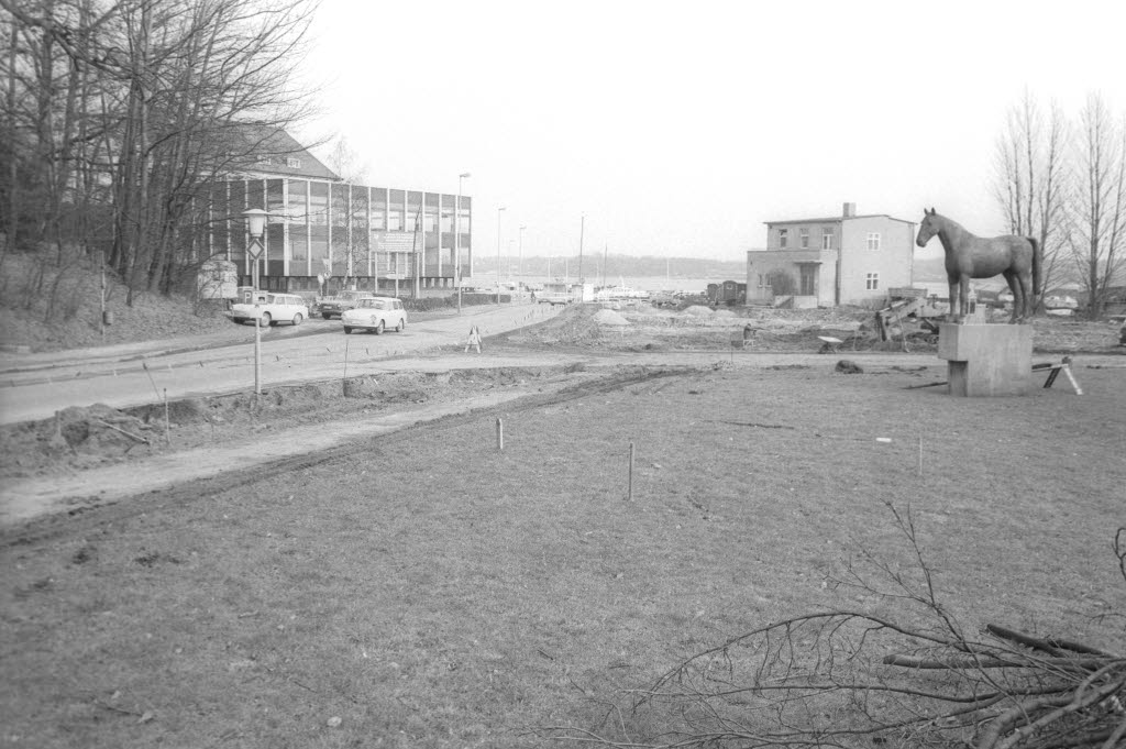 Im Vordergrund rechts die Plastik "Meteor" vor dem Landwirtschaftsministerium.